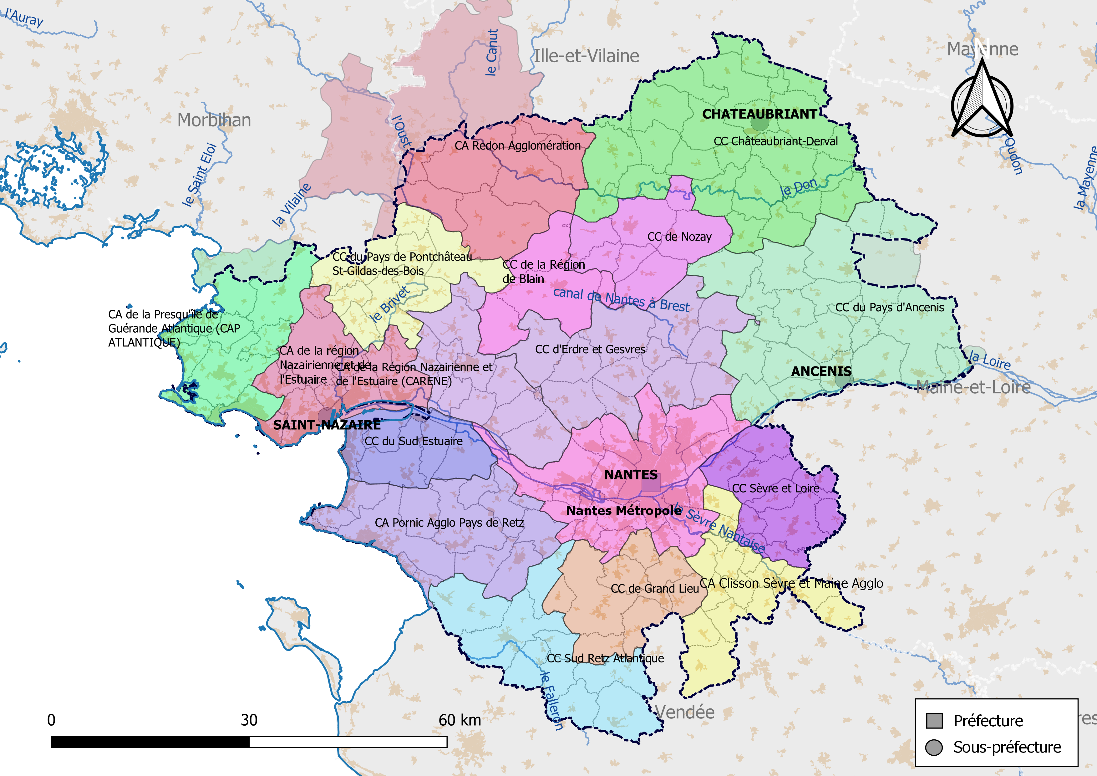 Carte des intercommunalités du département de la Loire-Atlantique, France. Composition au 1er janvier 2019.